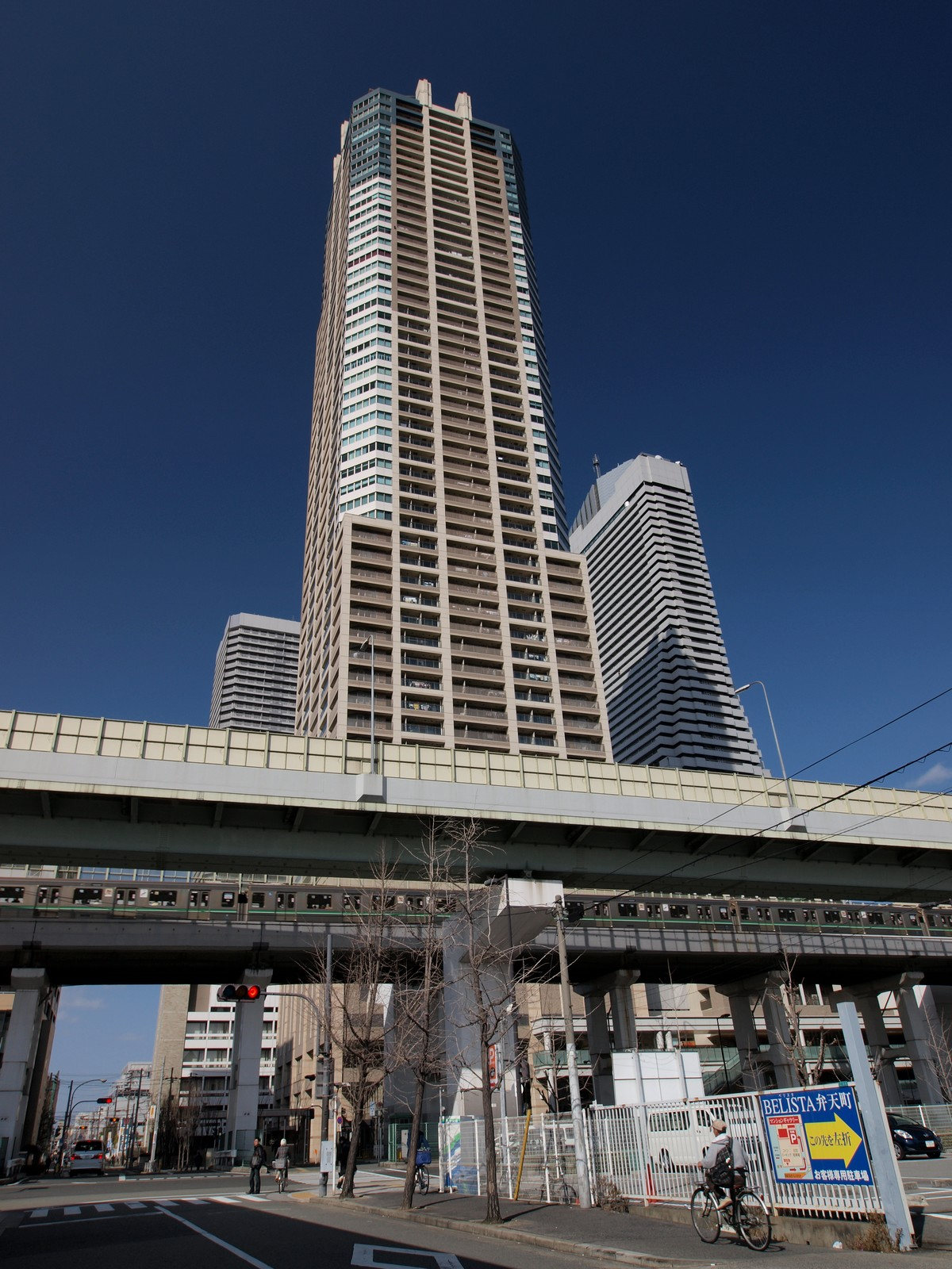 クロスタワー大阪ベイ所在地：大阪府大阪市港区弁天1丁目3-1、3-2